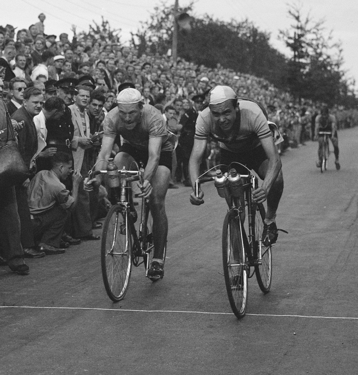 Collectie / Archief : Fotocollectie Anefo Reportage / Serie : [ onbekend ] Beschrijving : Wereldkampioenschappen Wielrennen op de weg te Valkenburg. Amateurs. 2e, 3e en 4e passeren de finish Annotatie : De Belg Liévin Lerno (2e), links Olle Wänlund (3e), in de achtergrond Wim van Est die 4e werd Datum : 21 augustus 1948 Locatie : Limburg, Valkenburg Trefwoorden : sport, wielrennen Fotograaf : Merk, Ben / Anefo Auteursrechthebbende : Nationaal Archief Materiaalsoort : Glasnegatief Nummer archiefinventaris : bekijk toegang 2.24.01.09 Bestanddeelnummer : 902-9321